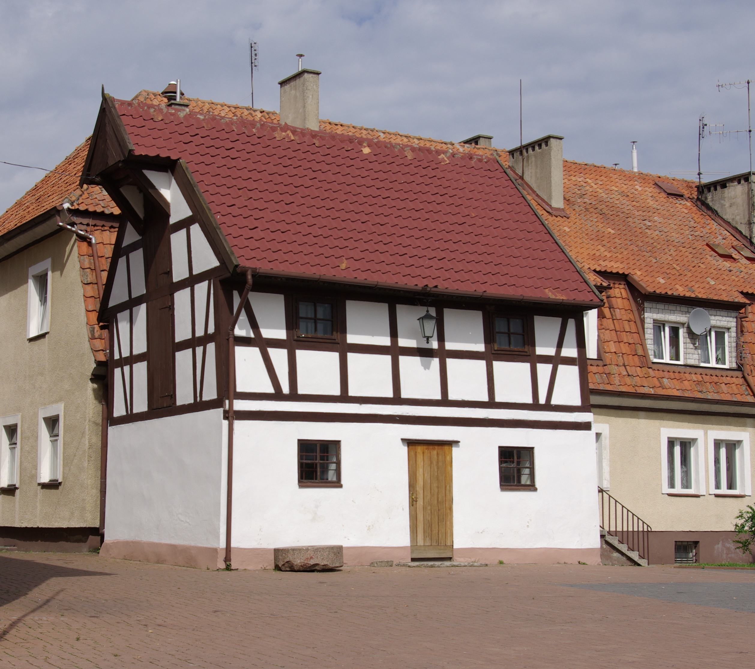 Srokowo - spichlerz